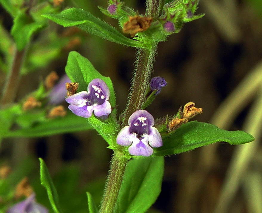 Pievinė žvirgždė (Acinos arvensis) Šeima. Notreliniai (Lamiaceae) Foto: Algirdas, 2006 m. birželio 26 d., Lietuva.